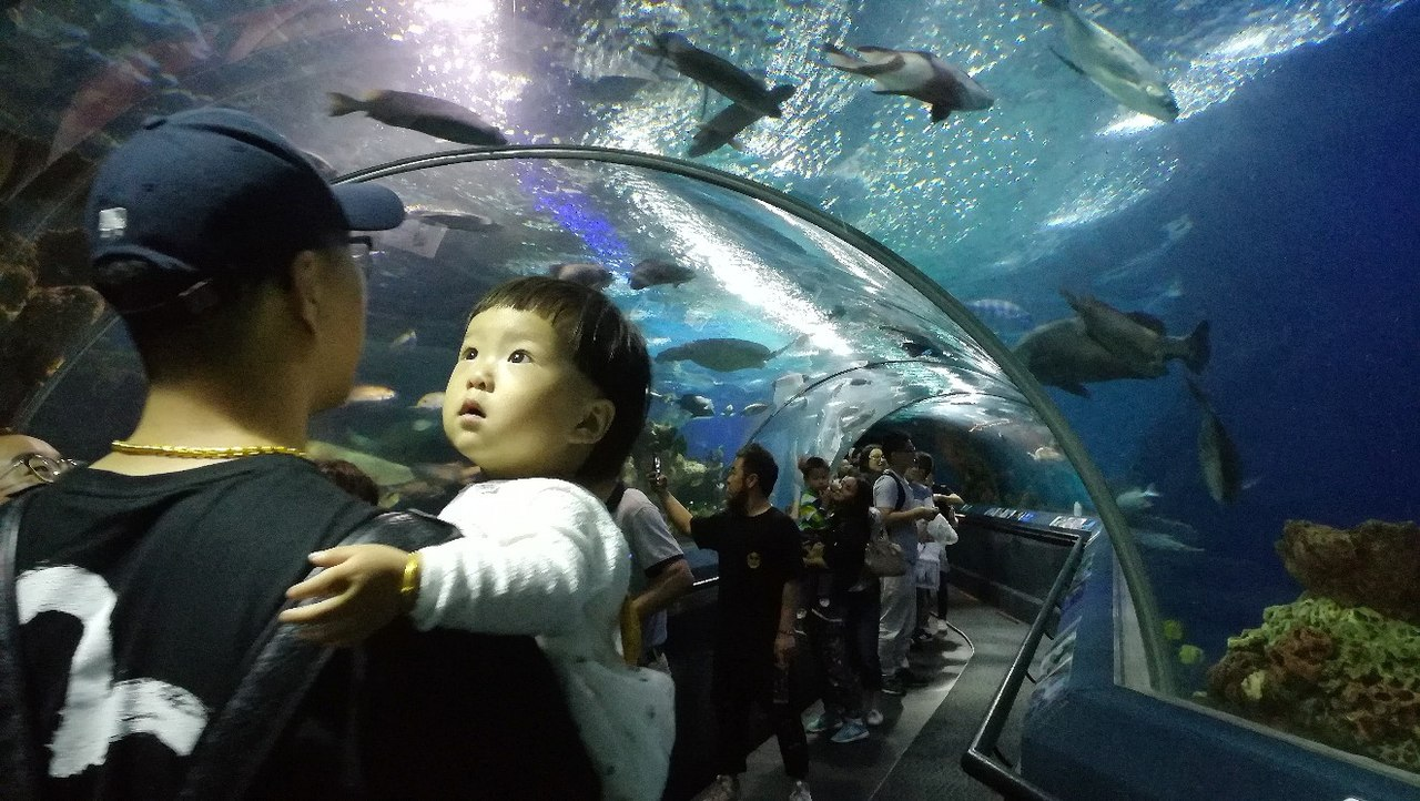 Oceanarium in Shanghai, China